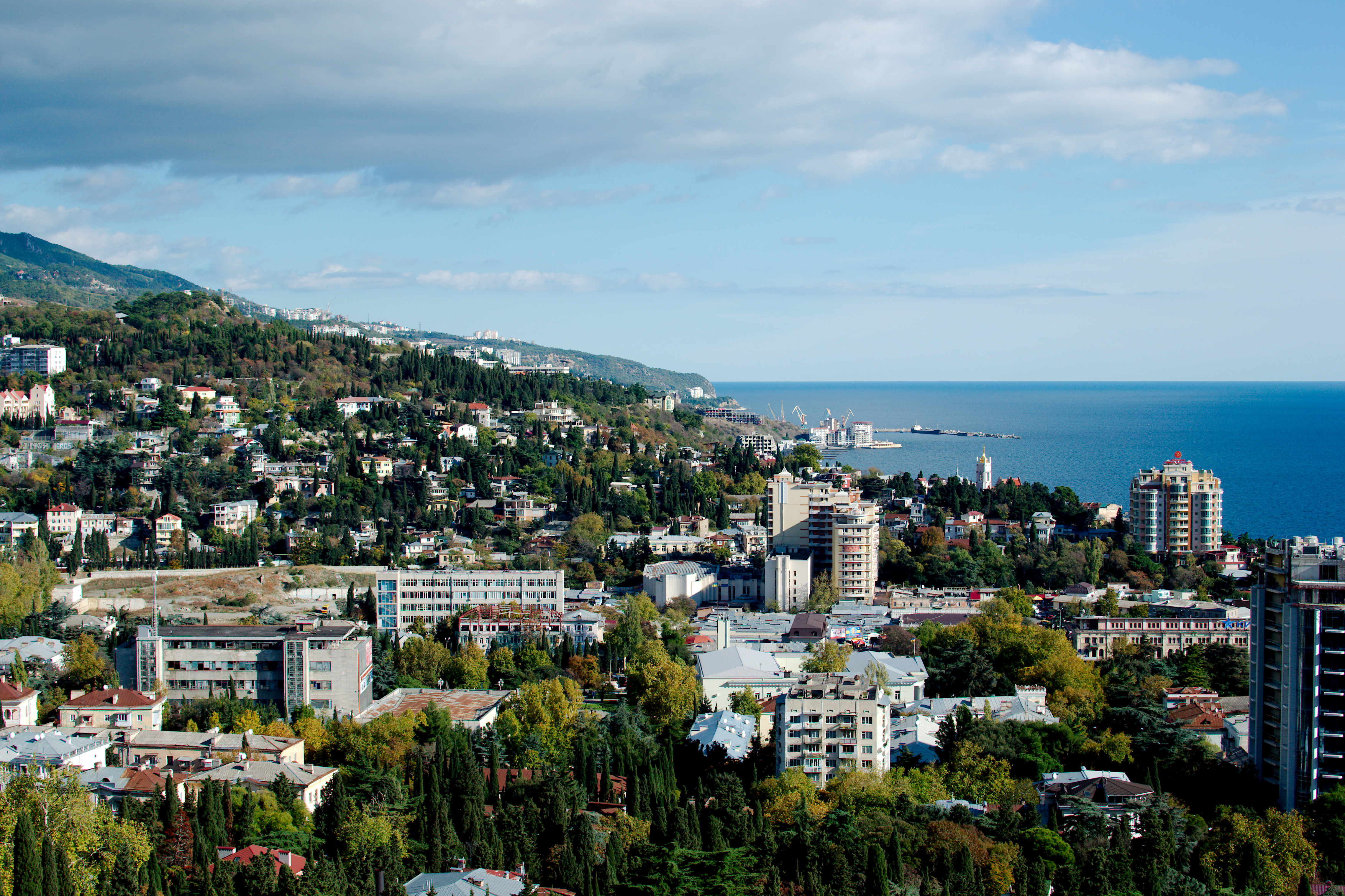 Yalta